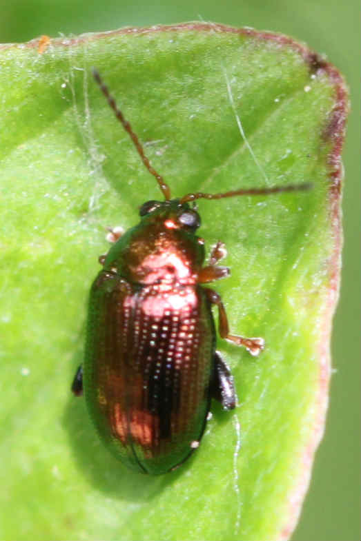 Goldener Erdfloh (Crepidodera aurea), am 9.5.2017 am Rheinufer südlich von Mannheim